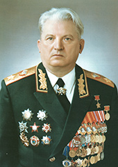 Семён Константинович Куркоткин (1917 — 1990) — советский военачальник, Маршал Советского Союза